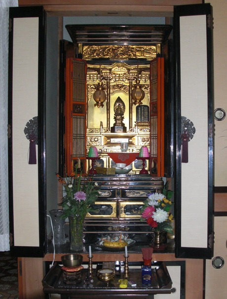 Otaru Butsudan (Otaru-shi, Japan)